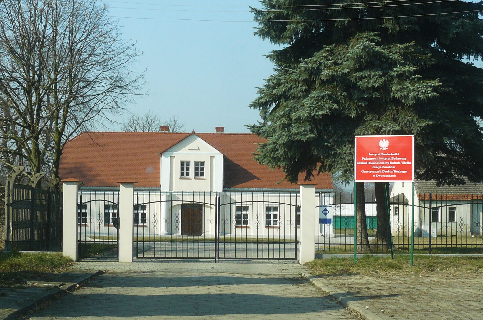 Instytut Zootechniki, Stacja Zasobów Genetycznych Drobiu Wodnego, Dworzyska.